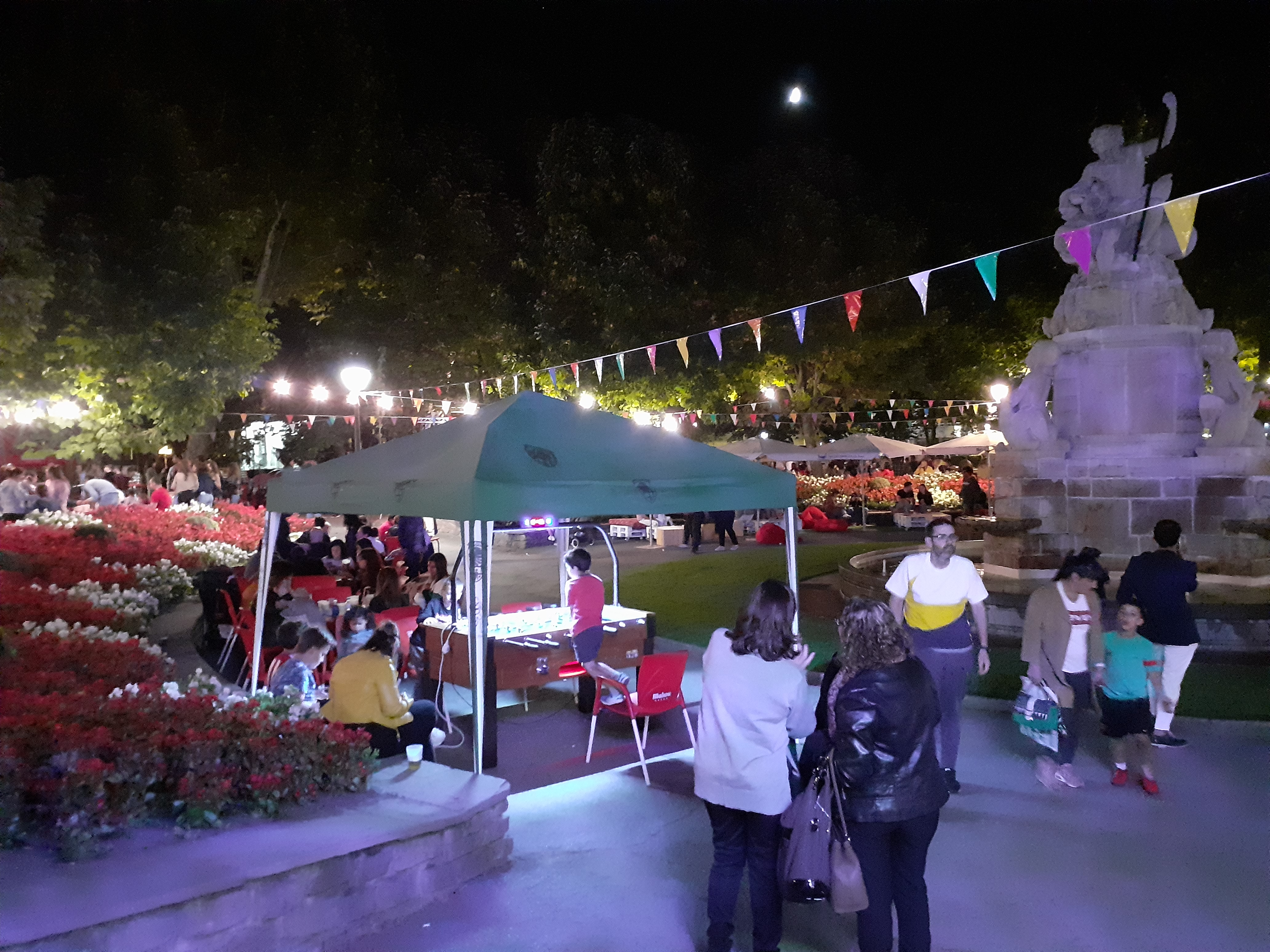 Fiestas de San Froilán en el jardin de San Francisco